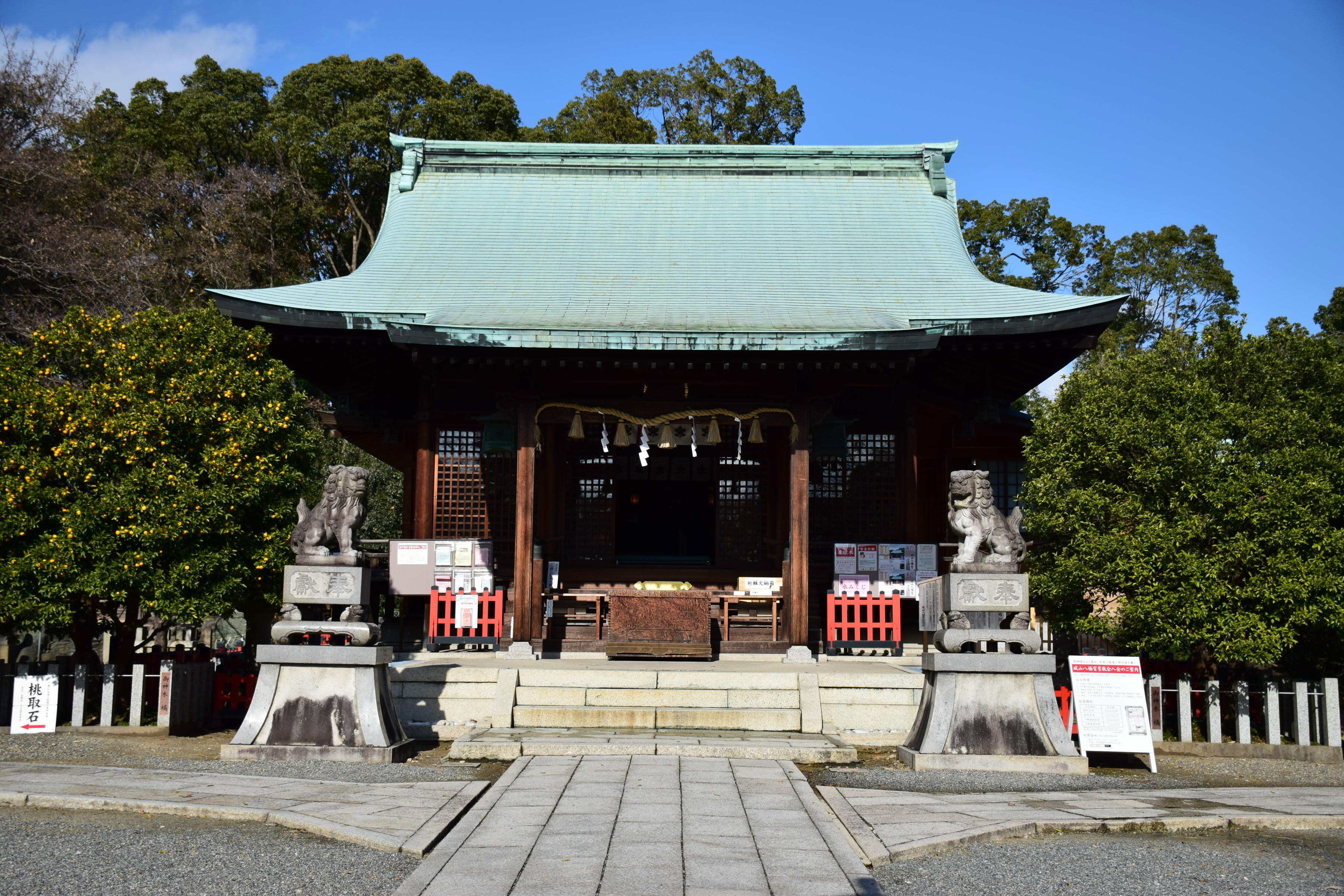 城山八幡宮拝殿